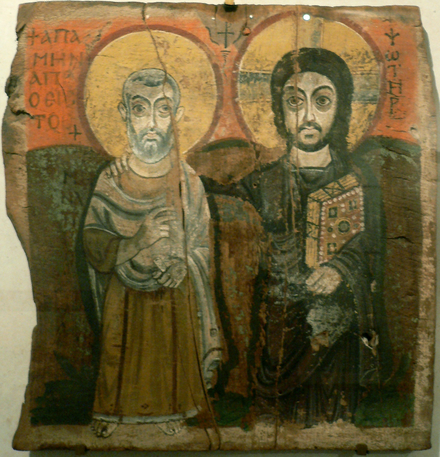 Panneau du Christ et de l'abbé Ména. VIe - VIIe siècle après J.-C. Monastère de Baouit. Peinture à la cire et à la détrempe sur bois de figuier.Jesus and Minas Coptic icon,It is one of the oldest known icons in existence